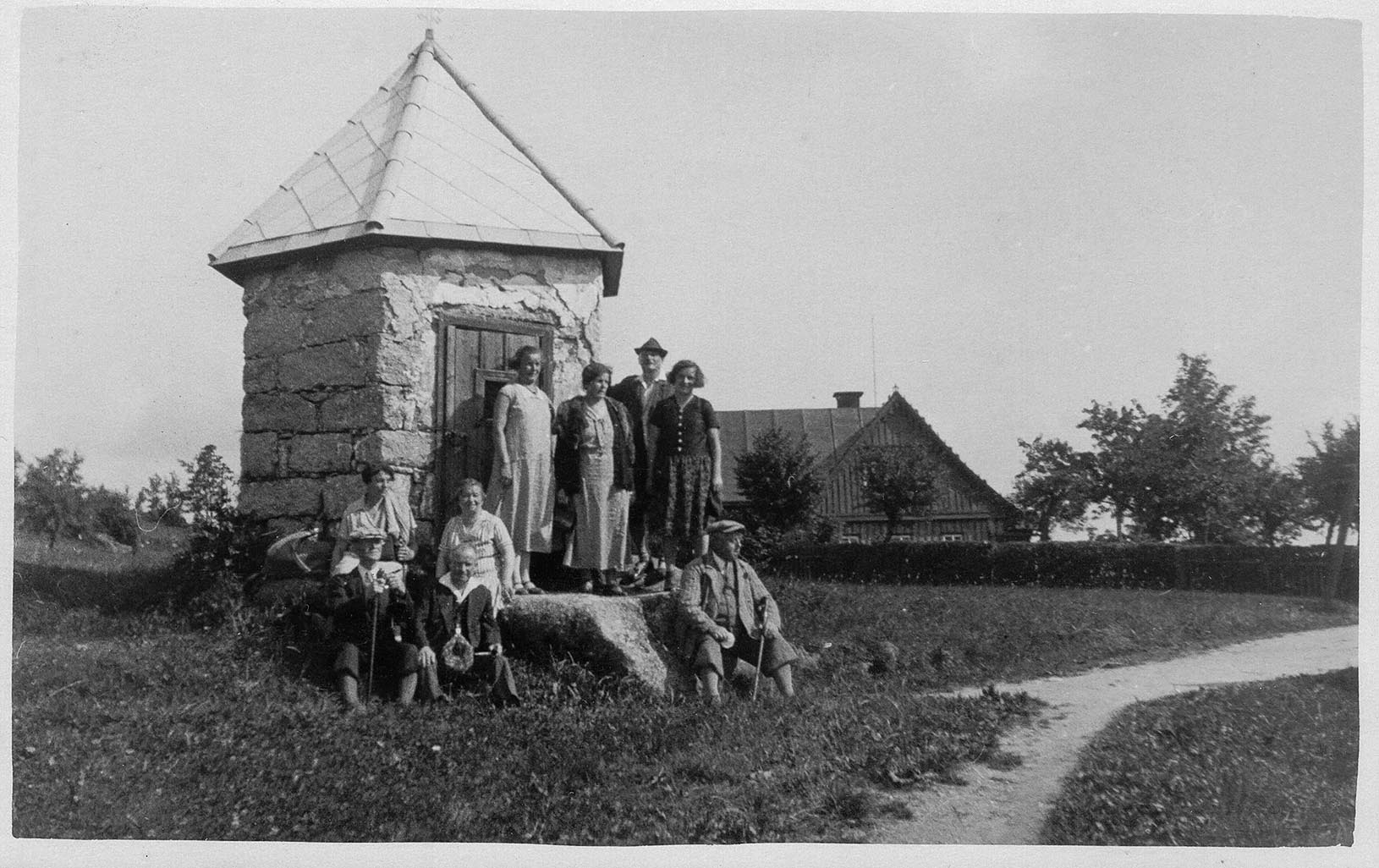 Brechmied Kapelle